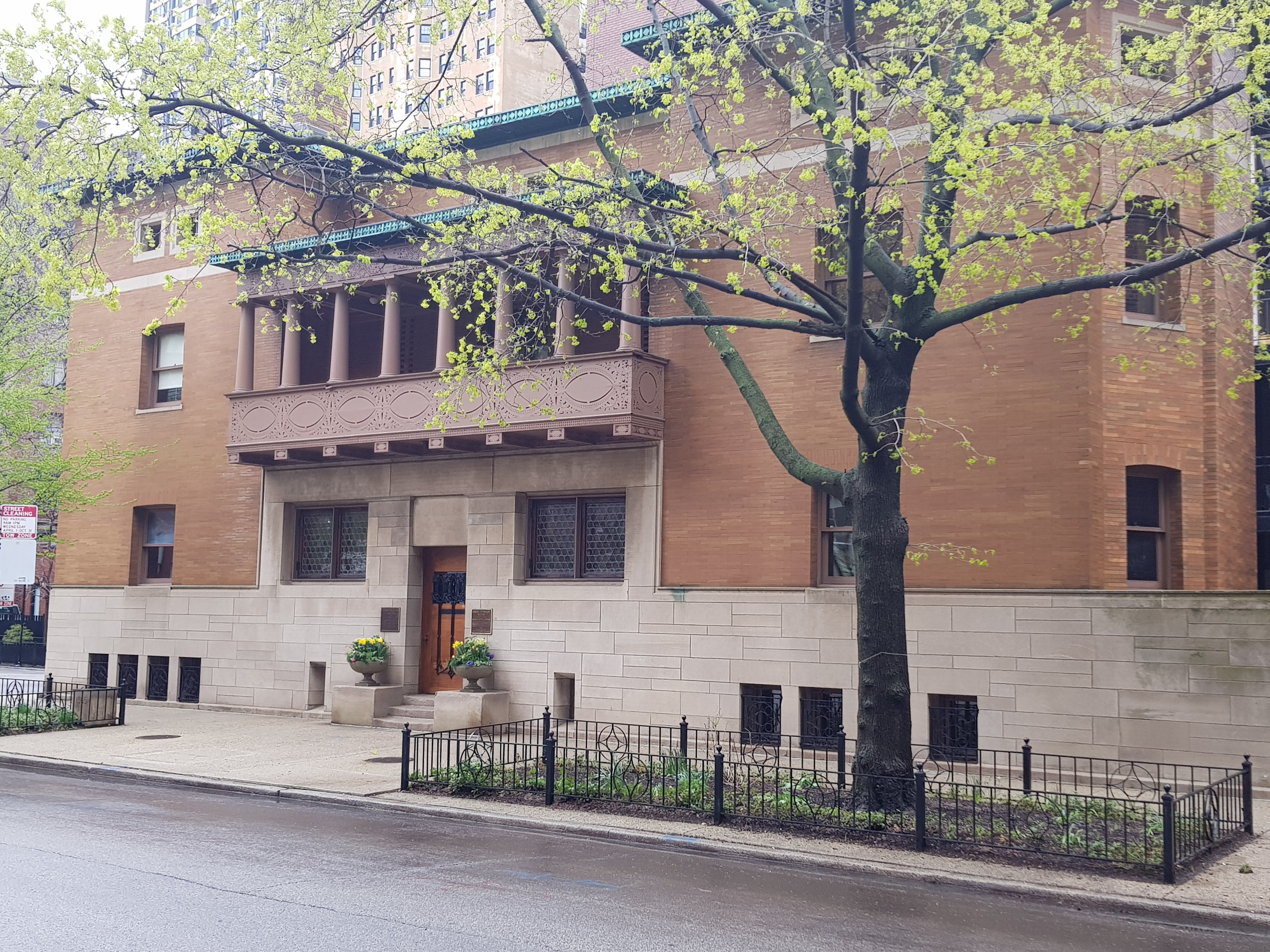 James Charnley House, Astor Street, Chicago (2019).